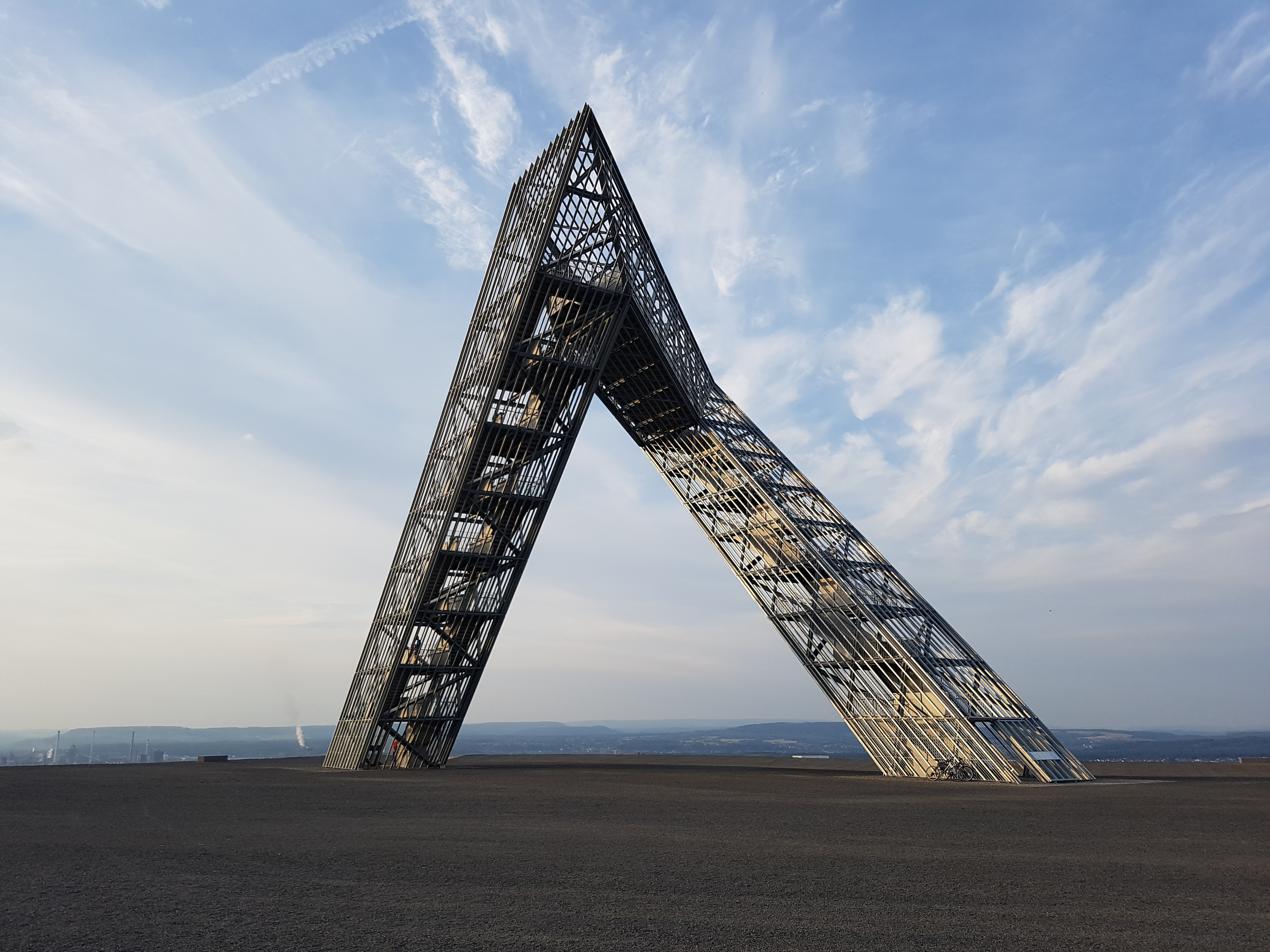 Das Saarpolygon auf der Bergehalde Duhamel in Ensdorf erinnert an die alte Bergbautradition im Saargebiet, blickt zugleich jedoch in die Zukunft. Die neue Landmarke im Saarland wurde am 16.09.2016 eingeweiht.